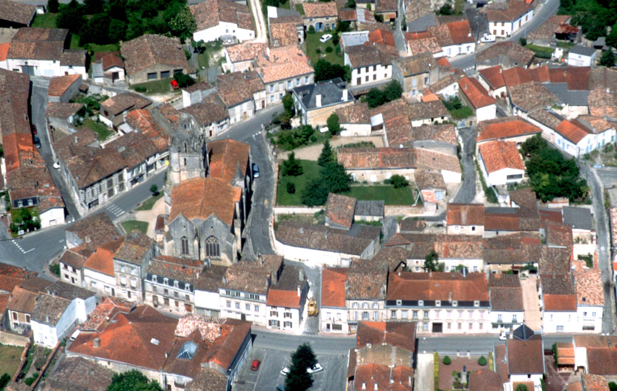 L'église initiale a été transformée dans le style gothique au cours du 16ème siècle. Son aspect actuel date d'une importante rénovation effectuée au 20ème siècle.